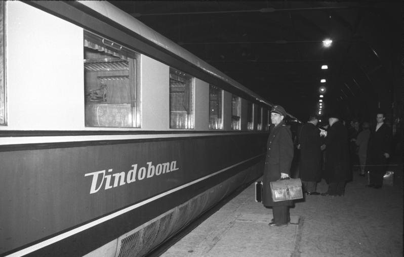 Zentralbild/Zühlsdorf 9.1.57 "Vindobona"-Express von Probefahrt zurück Von seiner ersten Probefahrt auf der Strecke Berlin-Prag-Wien ist am 8.1.1957 der "Vindobona"-Express zurückgekehrt. Die Aufnahme dieser neuen Verbindung, die offiziell für den 13.Januar 1957 vorgesehen ist, gehört zu wesentlichen Verbesserungen des internationalen Reiseverkehrs von und nach der DDR, die auf der europäischen Reisezugfahrplan- und Wagenbeistellungskonferenz im Oktober 1956 in Lissabon vereinbart worden waren. Der von der Deutschen Reichsbahn gestellte neue Schnellzugtriebwagen erster und zweiter Klasse, der im RAW-Wittenberge gebaut wurde, erhielt auf Wunsch der Österreichischen Bundesbahn die Bezeichnung "Vindobona", den römischen Namen für Wien. UBz.: Der "Vindobona"-Express auf dem Berliner Ostbahnhof.